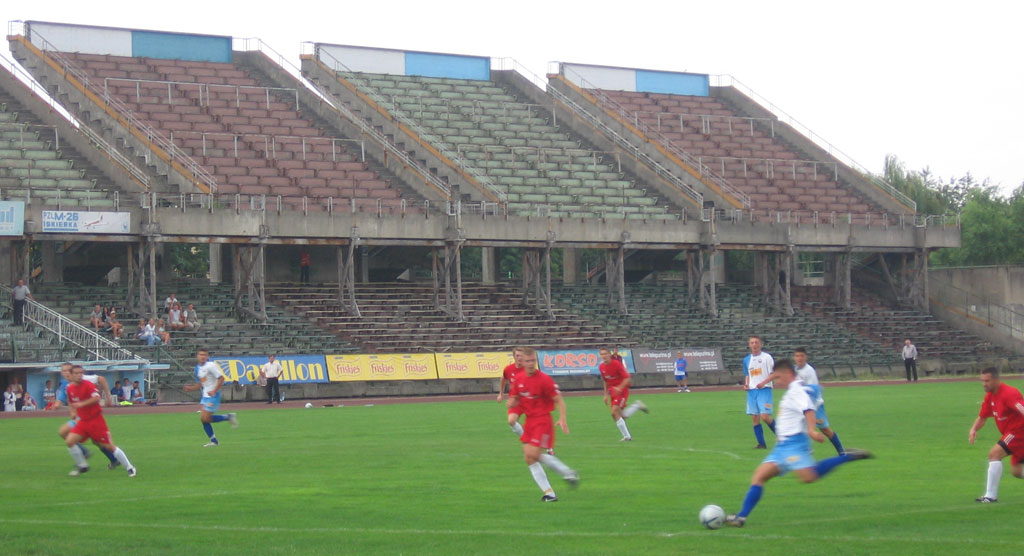 Piłkarze Stali Mielec w akcji. Mecz przeciw Błękitnym Ropczyce w Mielcu (12.08.2006)